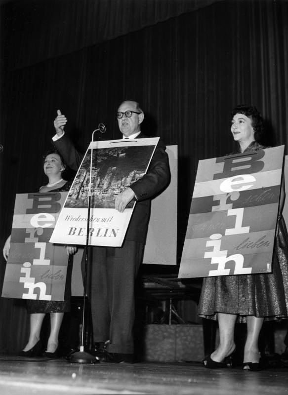 Kabarett, Die Insulaner Gastspiel im Metropol in Bonn Die Insulaner war eine von Günter Neumann gegründetet Kabarettsendung, die von 1948 bis 1964 zum Programm des RIAS gehörte.